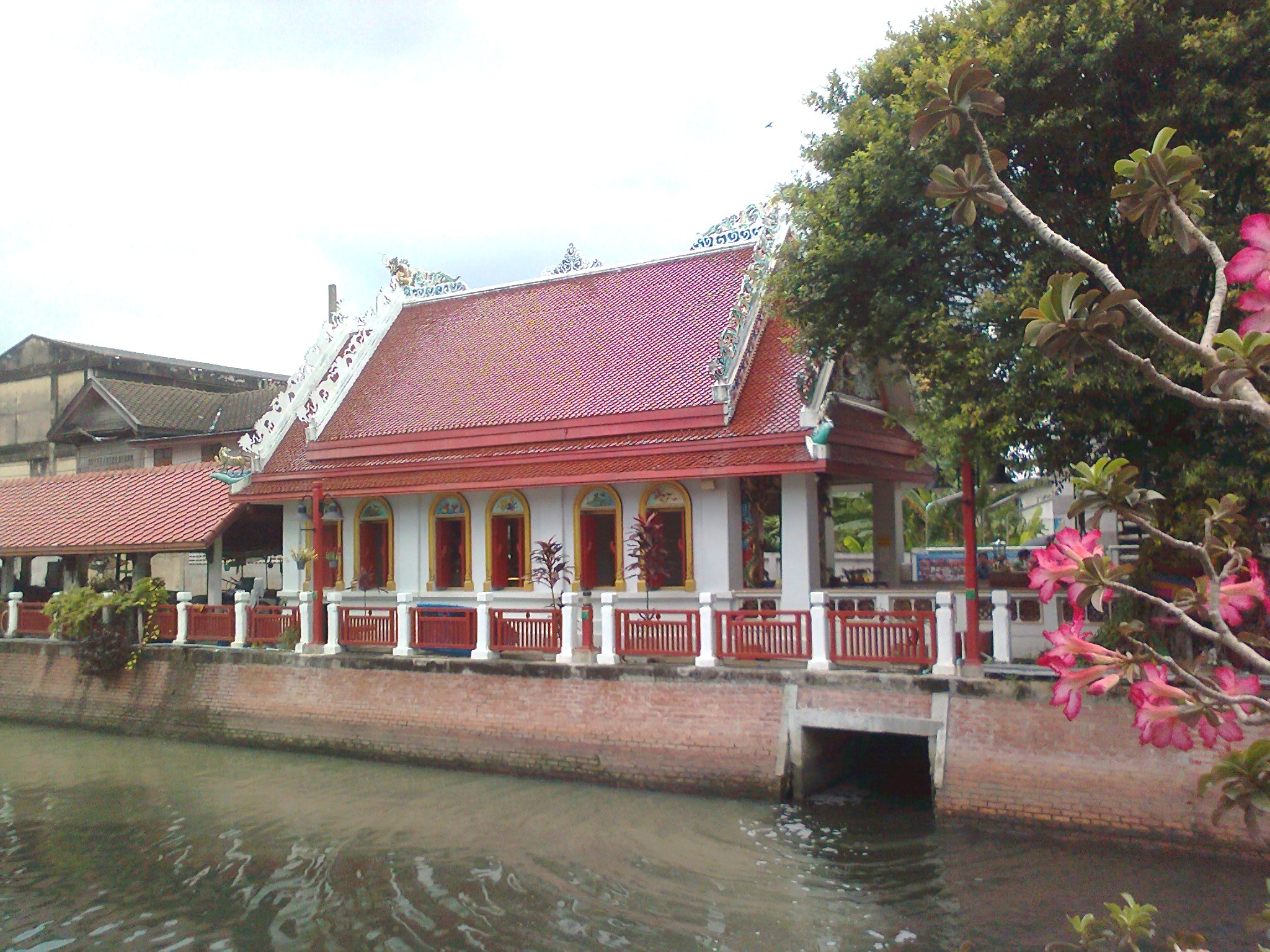 KING TAKSIN SHRINE_VIEW FROM BOWONNIWET PIER